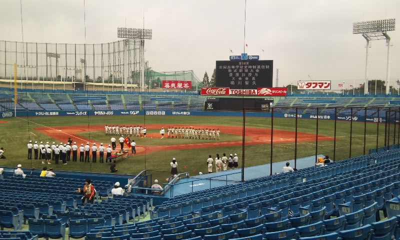 全国高等学校定時性通信制軟式野球大会の閉会式の写真です。